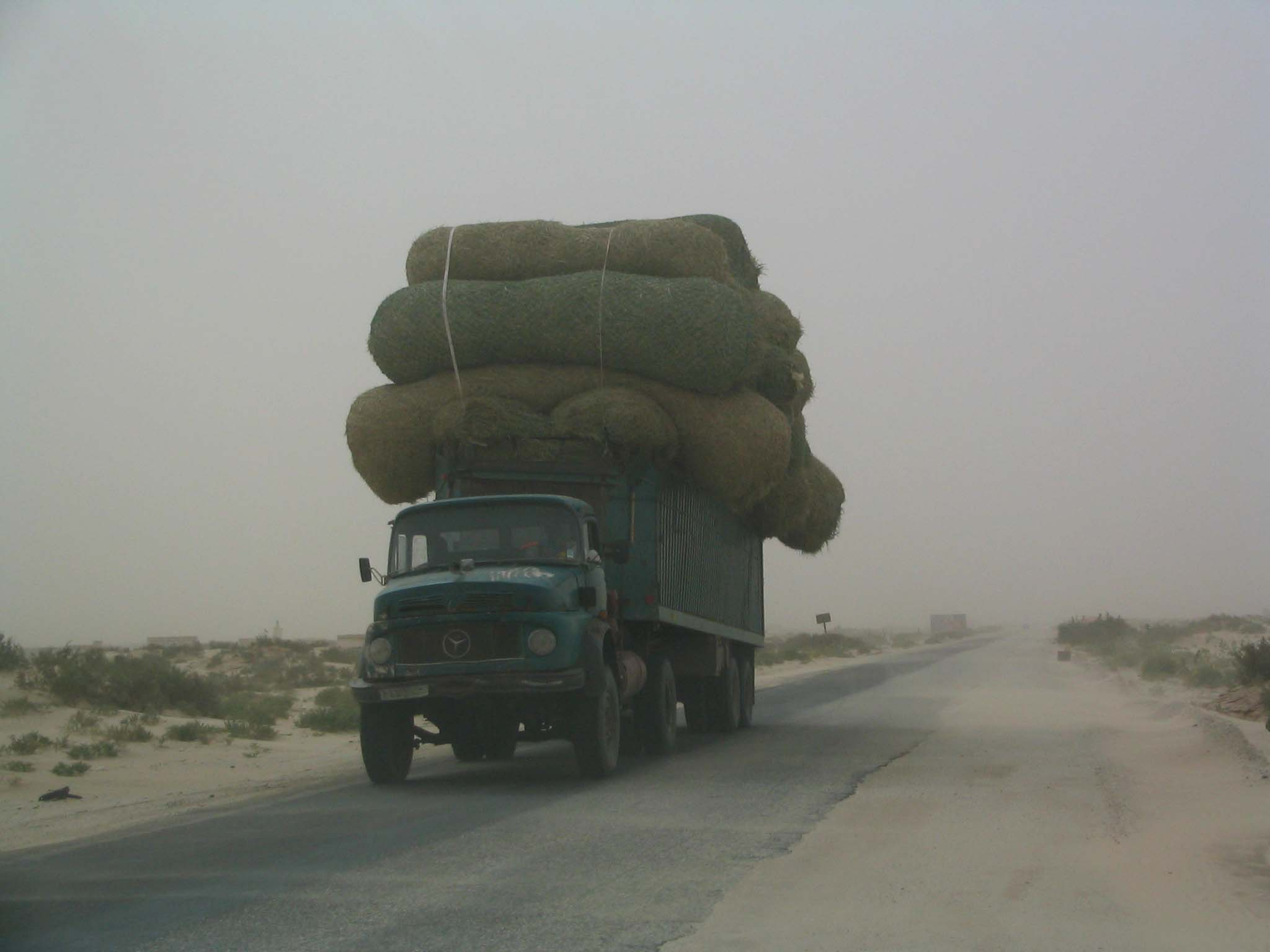 Transport routier en Mauritanie (route goudronnée Nouakchott-Rosso)